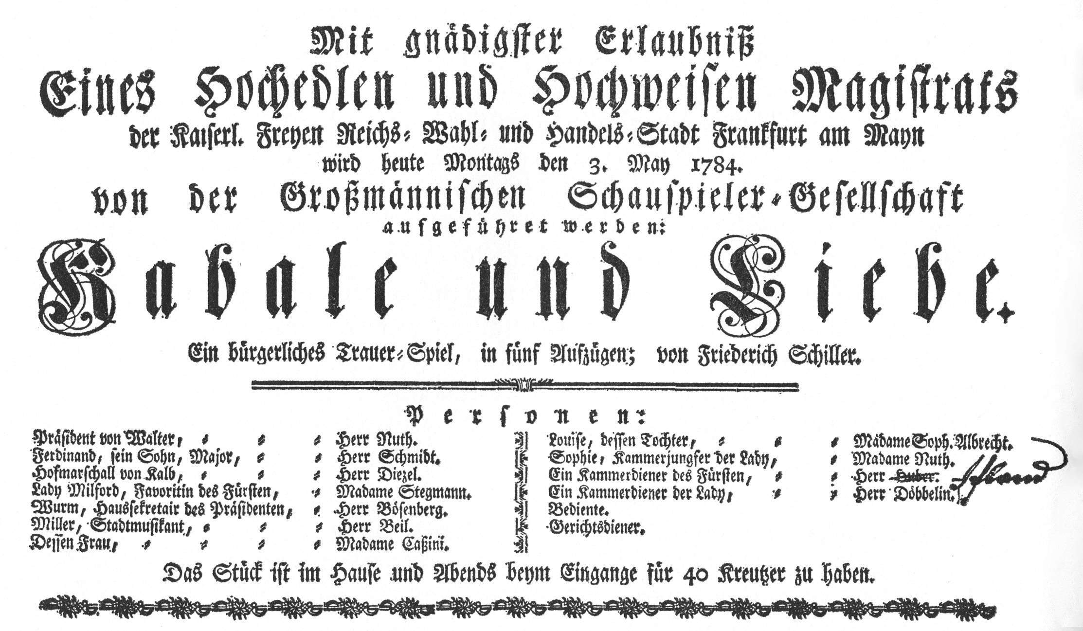 Theaterzettel der zweiten Aufführung von Schillers Kabale und Liebe am 3. Mai 1784 in Frankfurt am Main.